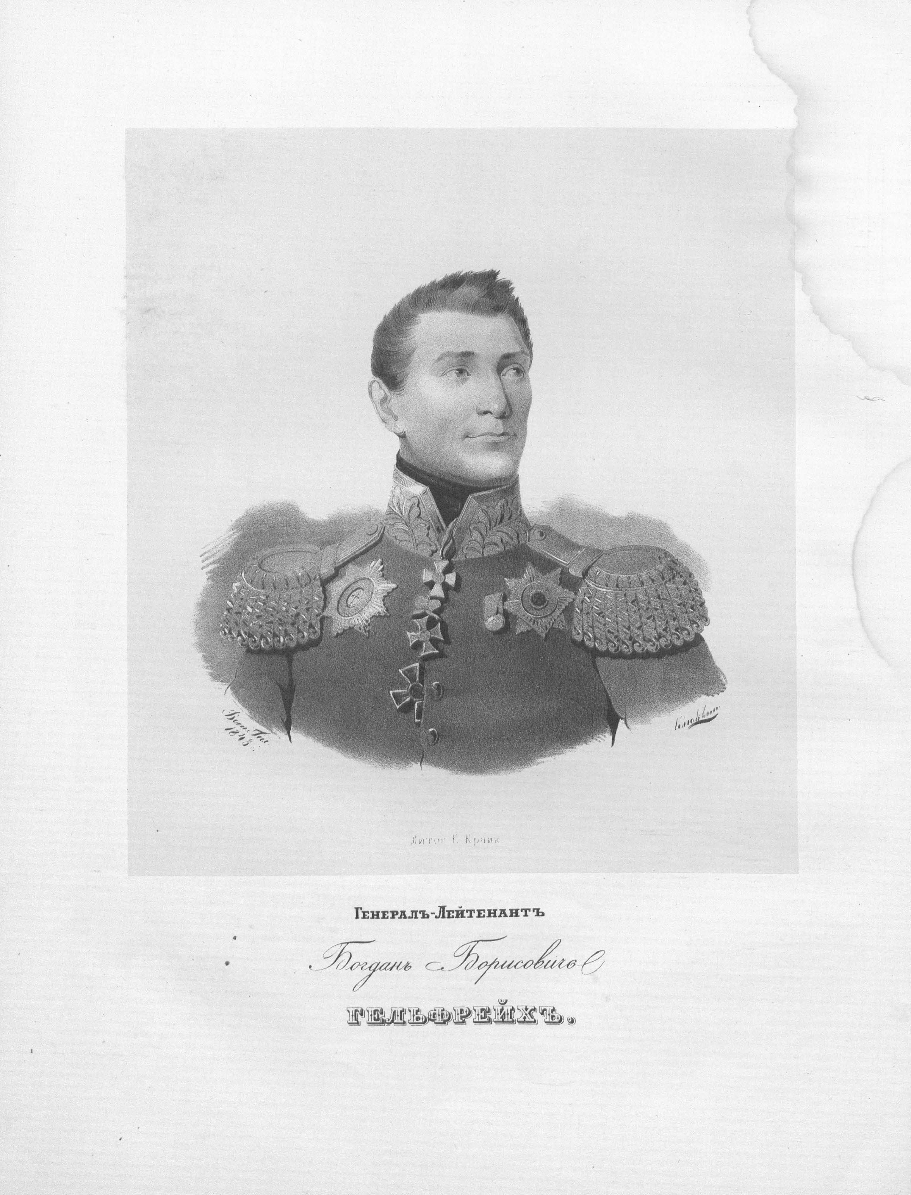 Генерал-лейтенант Богдан Борисович Гельфрейх